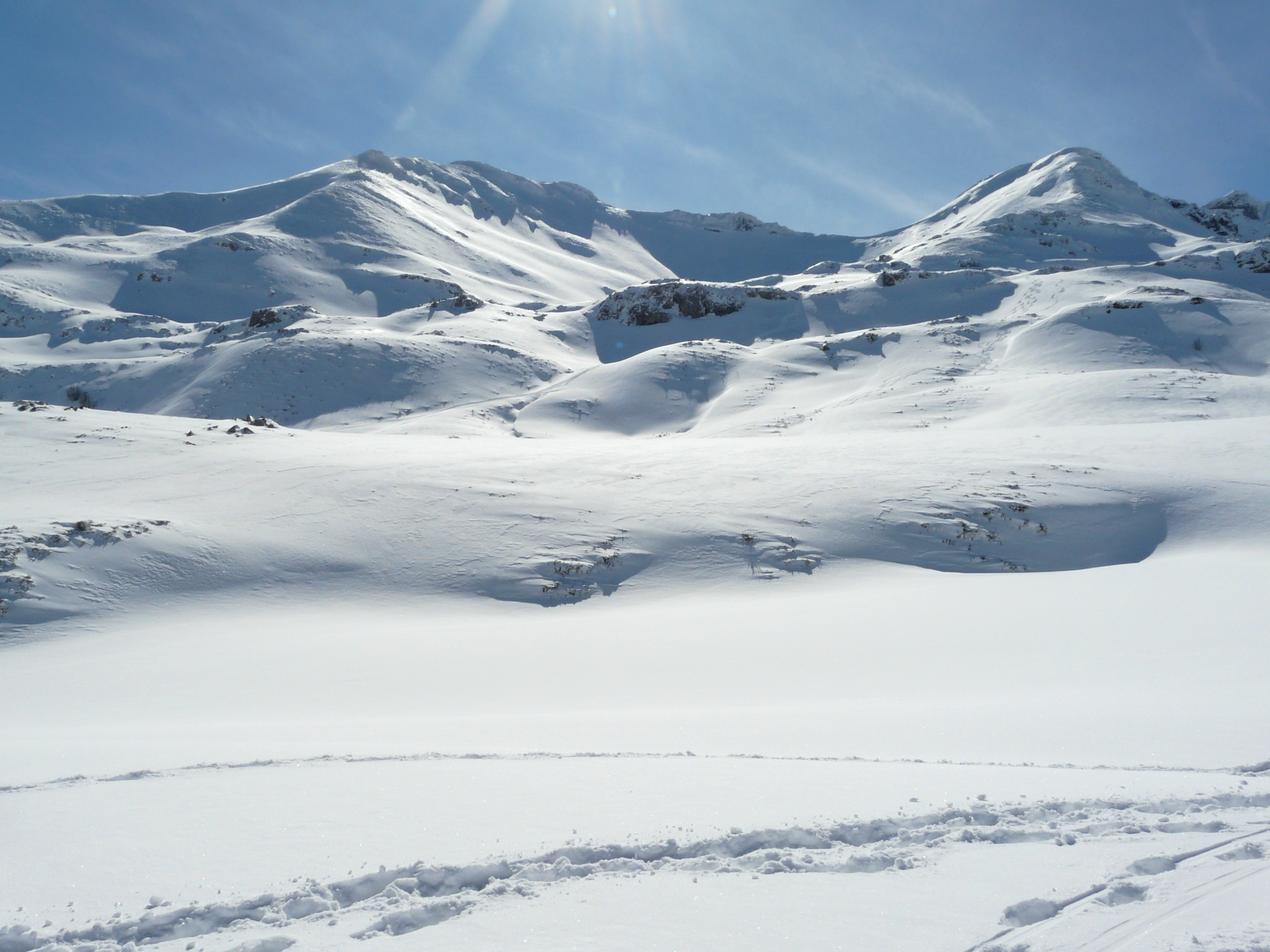 Paisaje del Puerto de Vegarada.